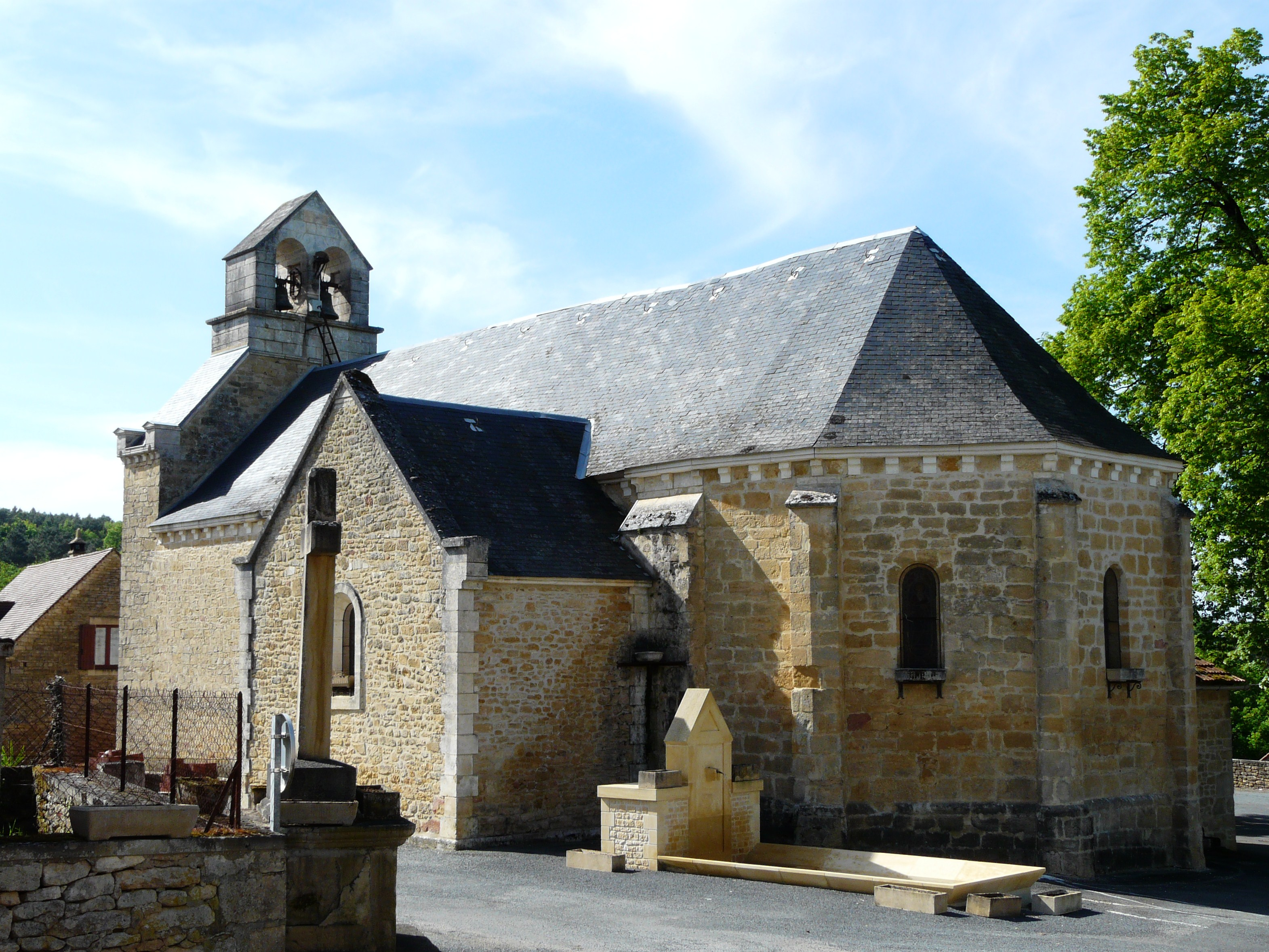 L'église Saint-Quentin de Saint-Quentin, Marcillac-Saint-Quentin, Dordogne, France.